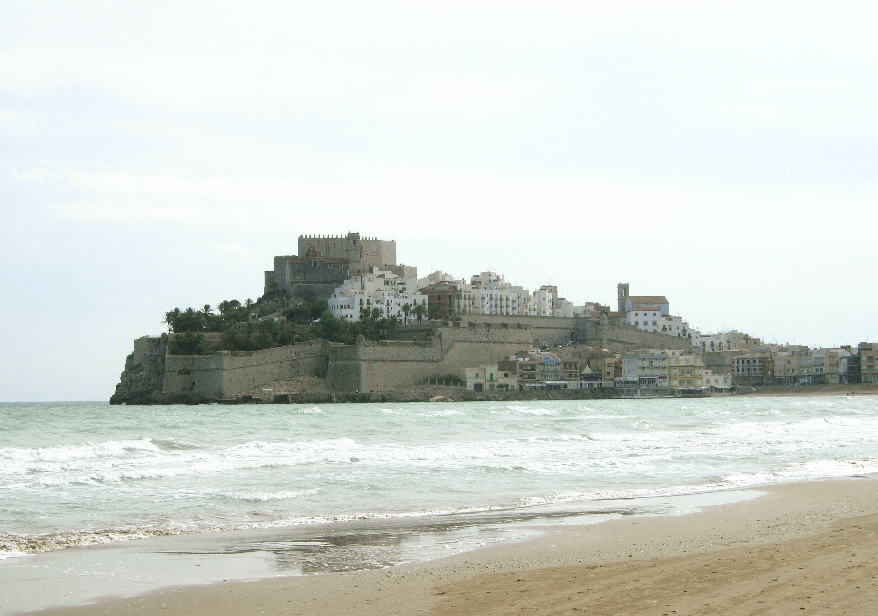 Peñiscola en otoño.